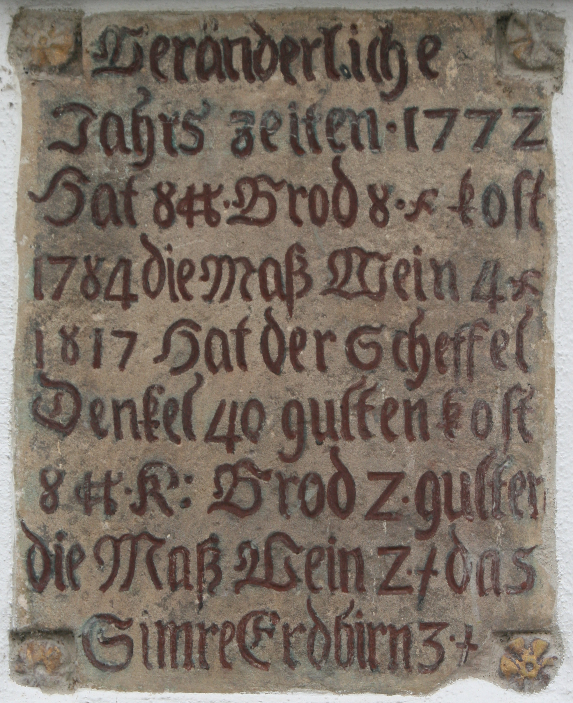 „Hungertafel“, die Lebensmittelpreise von 1772 bis 1817 verzeichnet, an einem um 1800 erbauten Kleinbauernhaus in Wüstenrot-Neulautern